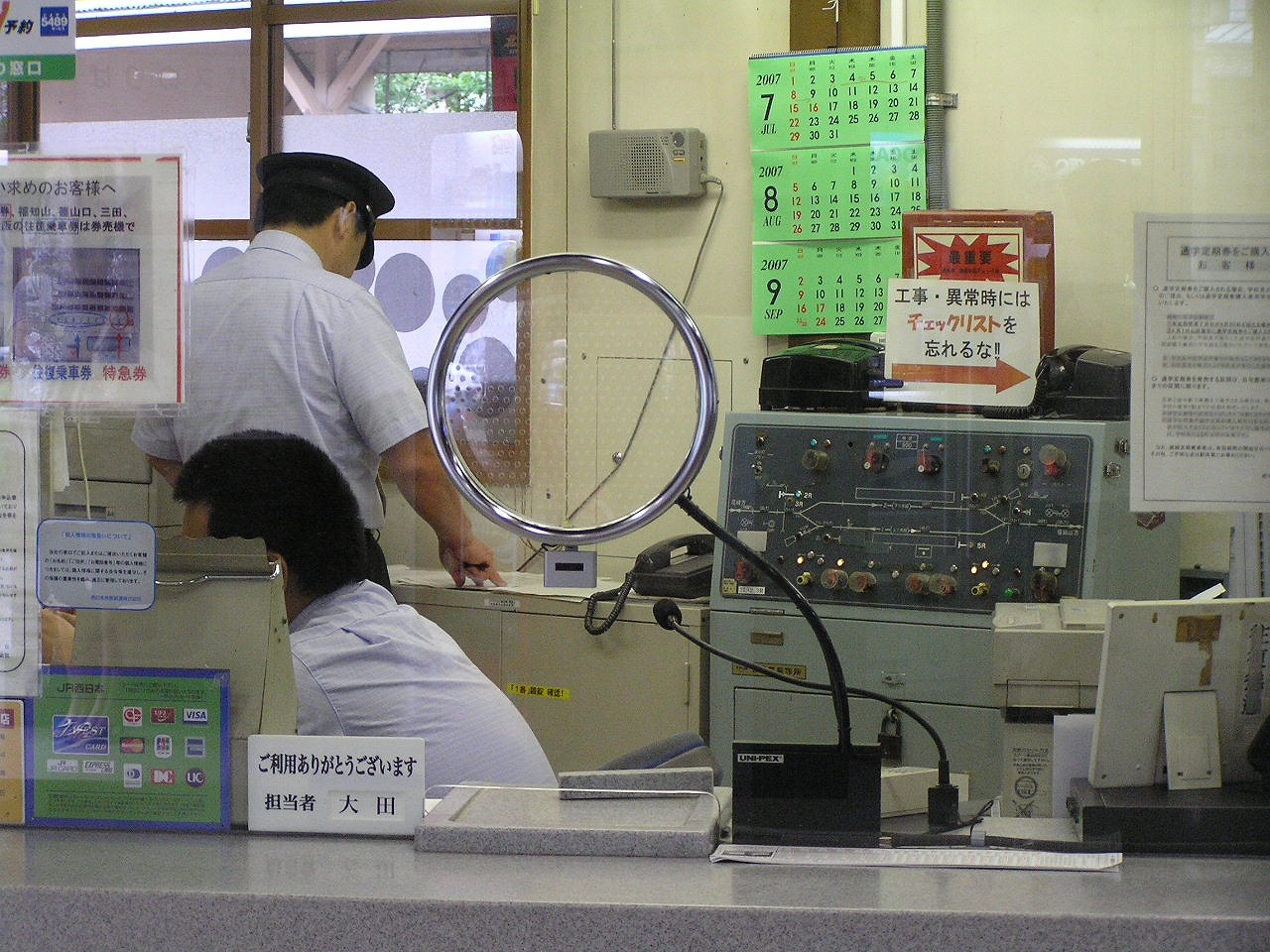 JR福知山線柏原駅駅務室